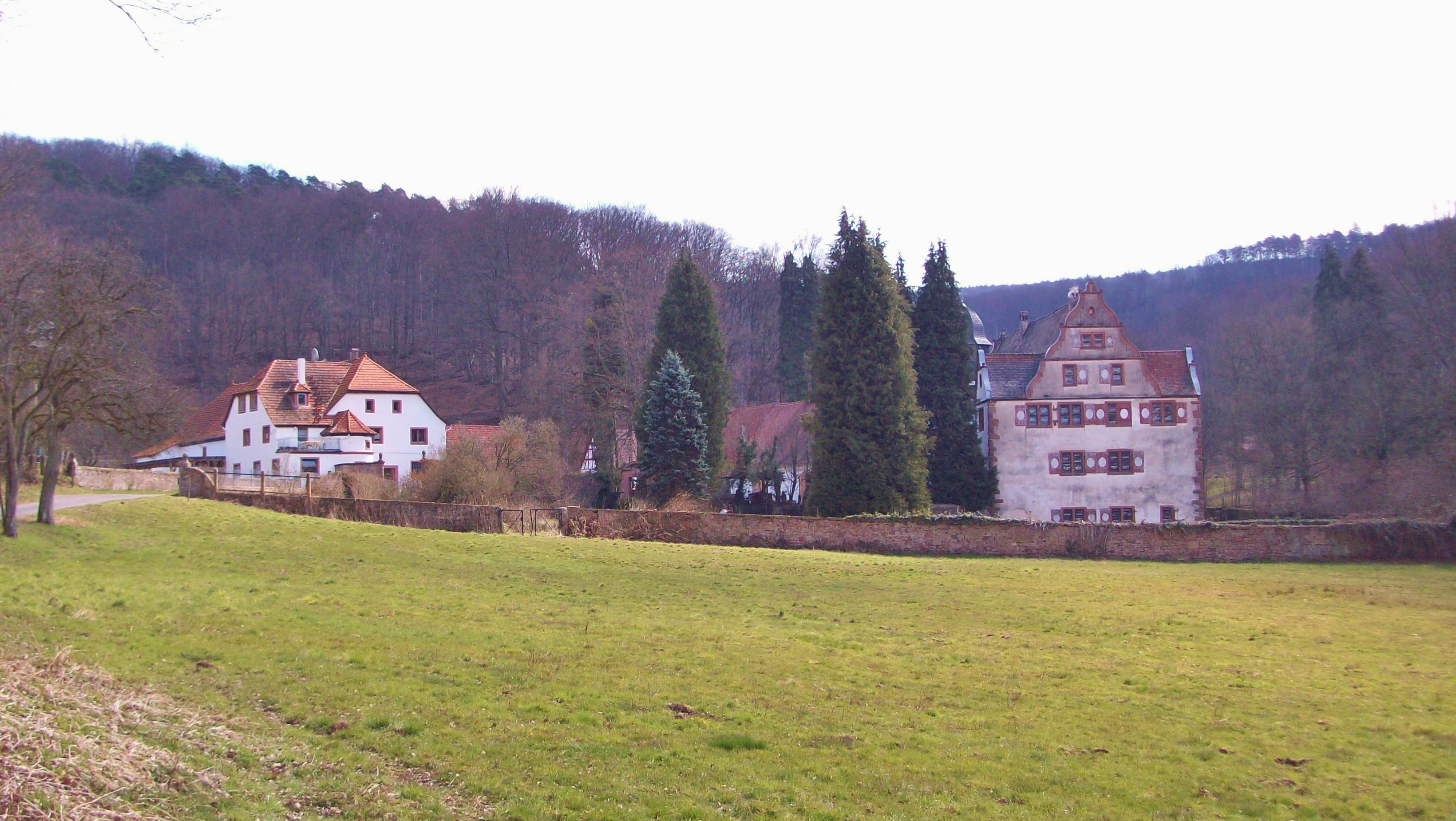 Wasserschloss Oberaulenbach, Ansicht des Zuganges aus Richtung Unteraulenbach